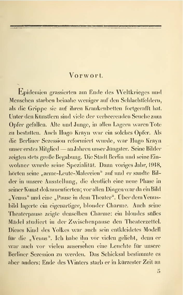 Karl Schwarz, Hugo Krayn. Mit einem Vorwort von Lovis Corinth. Leipzig : Klinkhardt & Biermann 1919